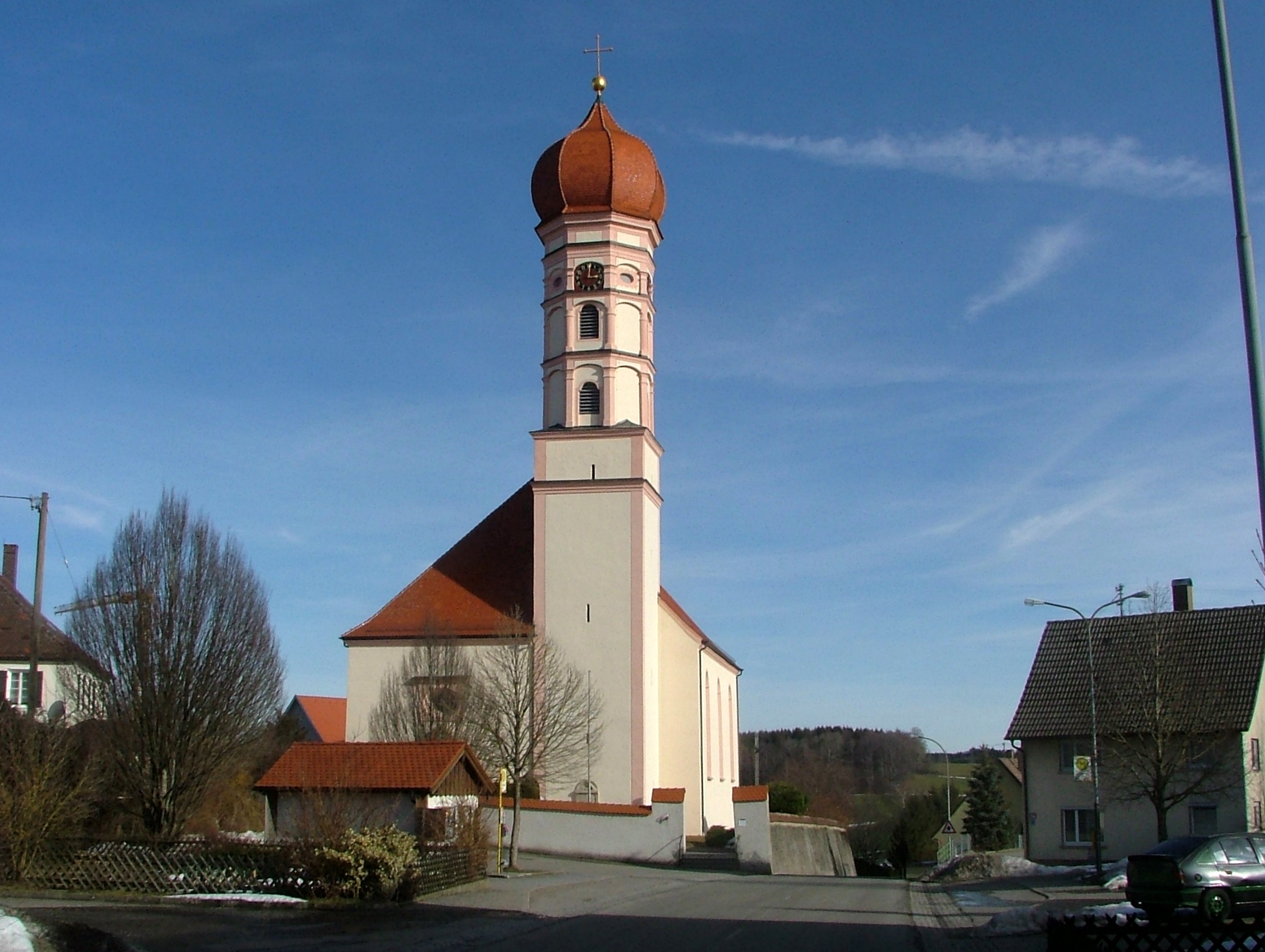 Steinhausen